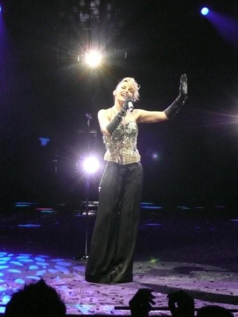 KylieX2008